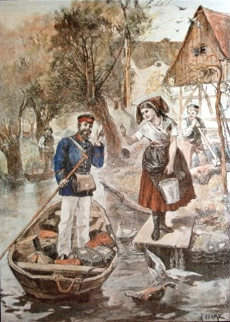 Postkarte: Landbriefträger im Spreewald, kolorierter Holzstich nach einer Zeichnung von W. Zehme